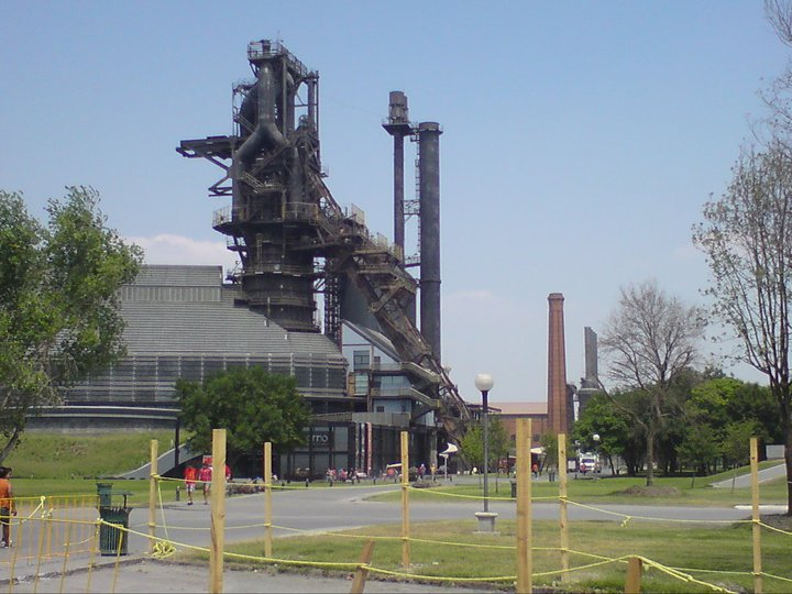 Horno 3 en el Parque Fundidora, aquí se llega durante el paseo Santa Lucia